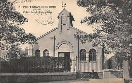 Fontenay-sous-Bois.Eglise Sainte-Marguerite